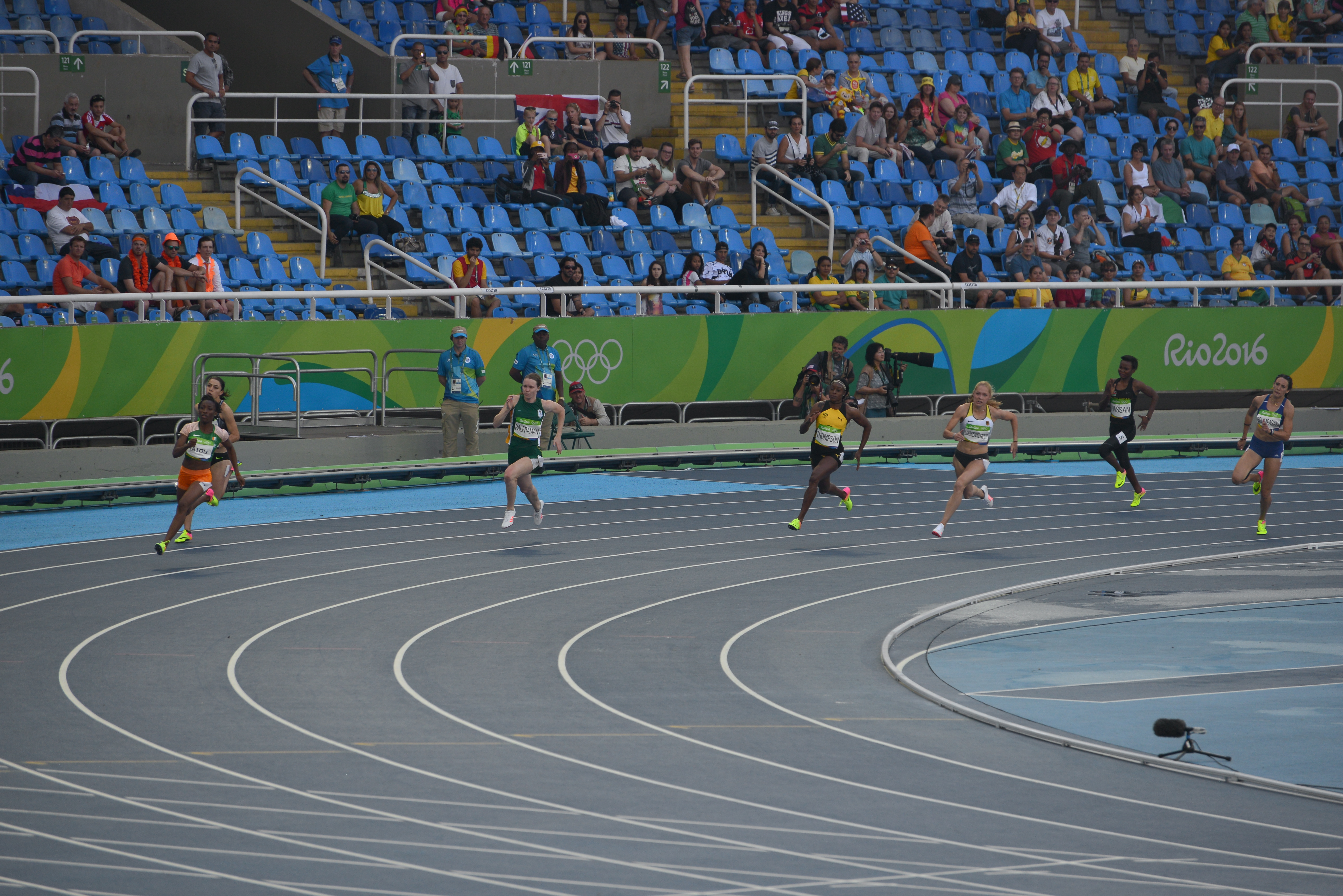 4ème Série du 200m féminin de Rio 2016